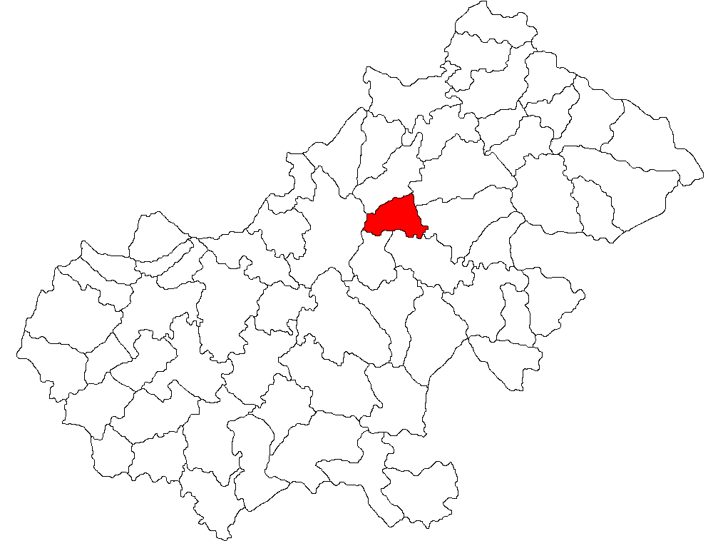 Categorie:Hărţi ale judeţului Satu Mare